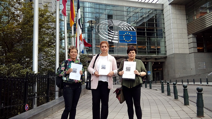 Altsasu Gurasoak Europar Parlamentuan